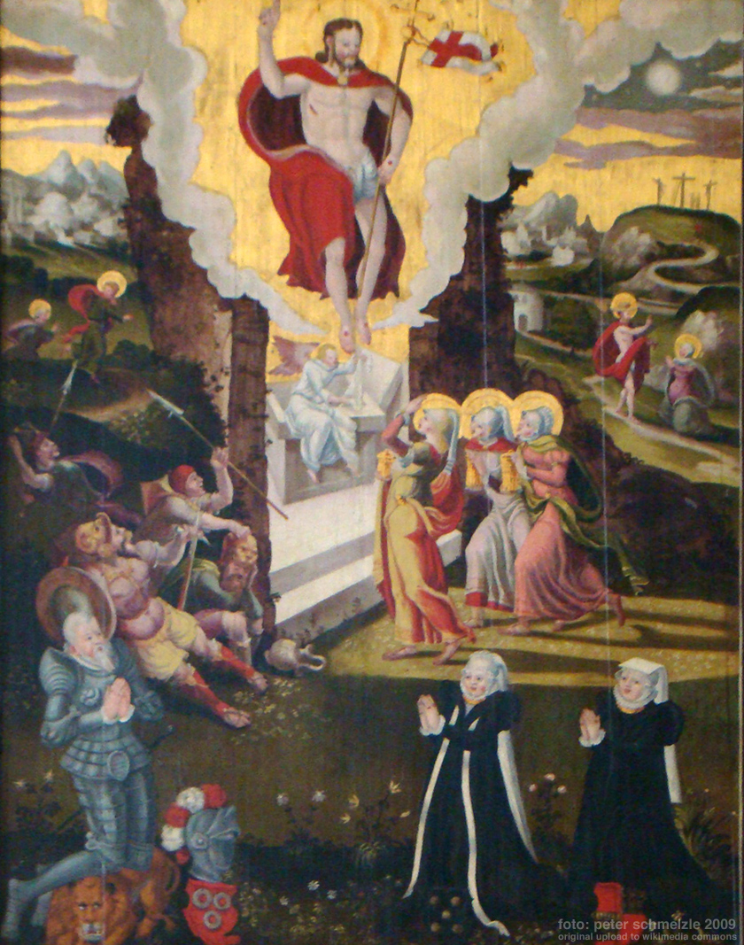 Detail des Epitaphs des Hartmann von Neipperg in der Stadtkirche Schwaigern